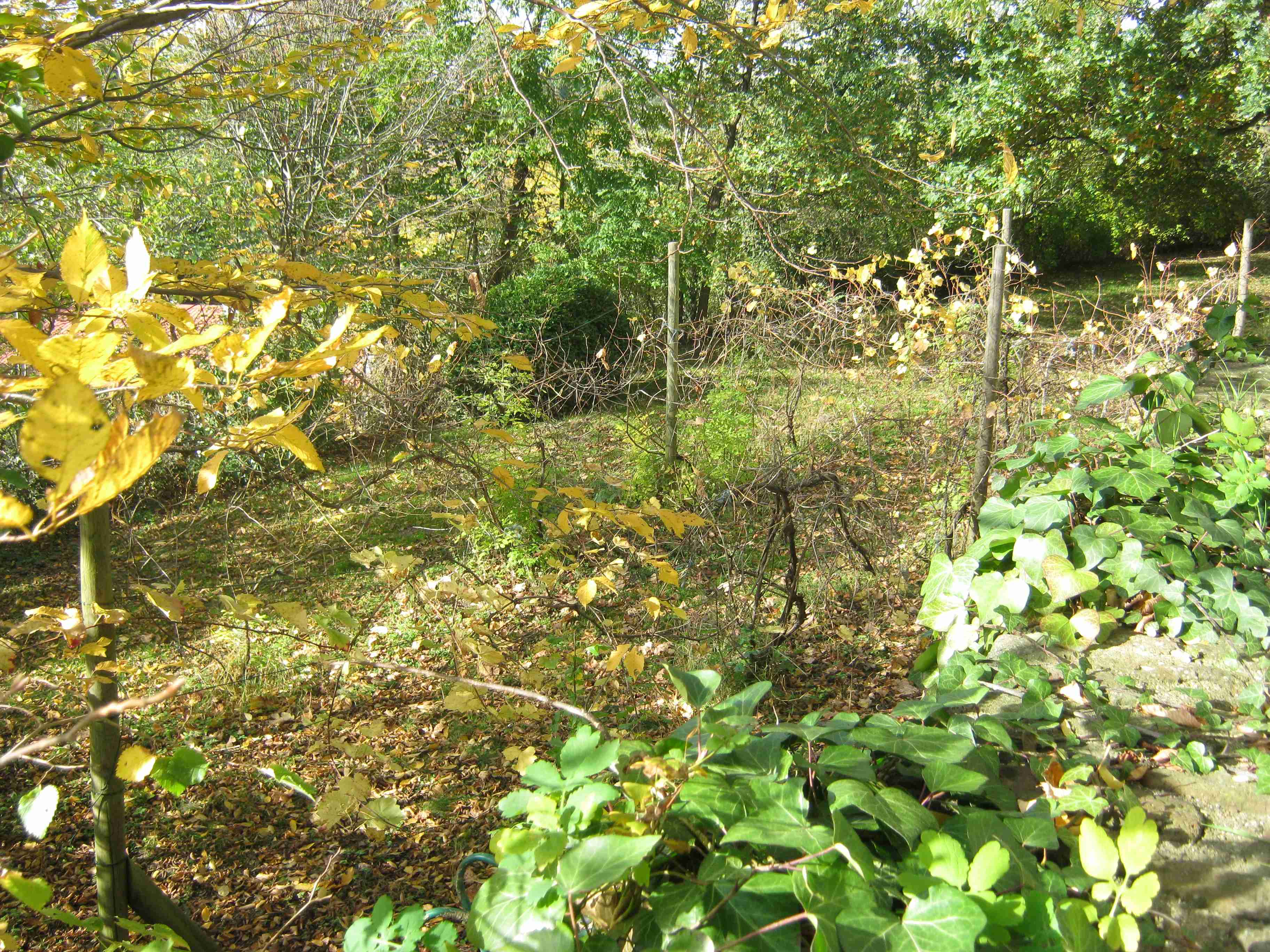 Weinberg unterhalb der Kirche St. Viktor in Nörvenich-Hochkirchen. Kreis Düren, am Neffelbach-Steilhang